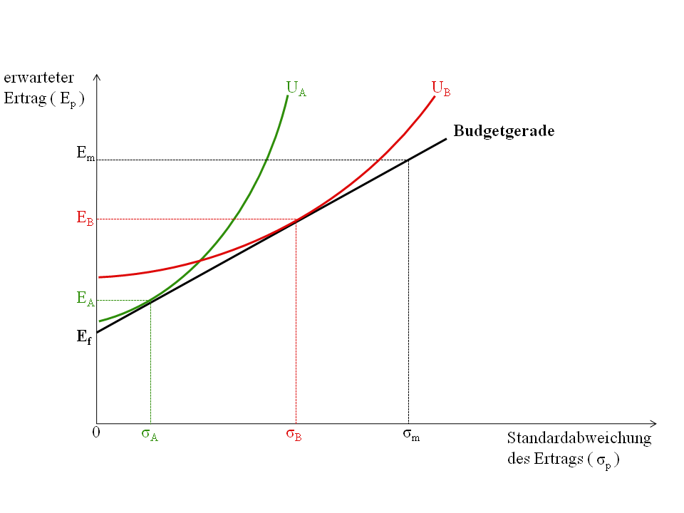 Grafik